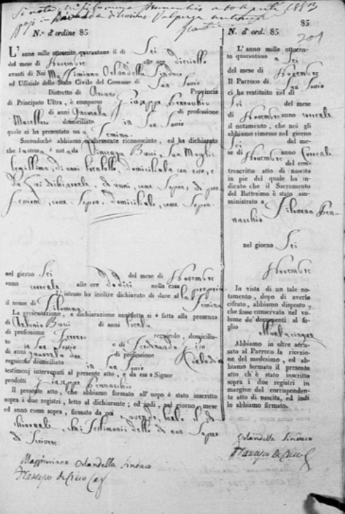 Atto di nascita della brigantessa Filomena Pennacchio